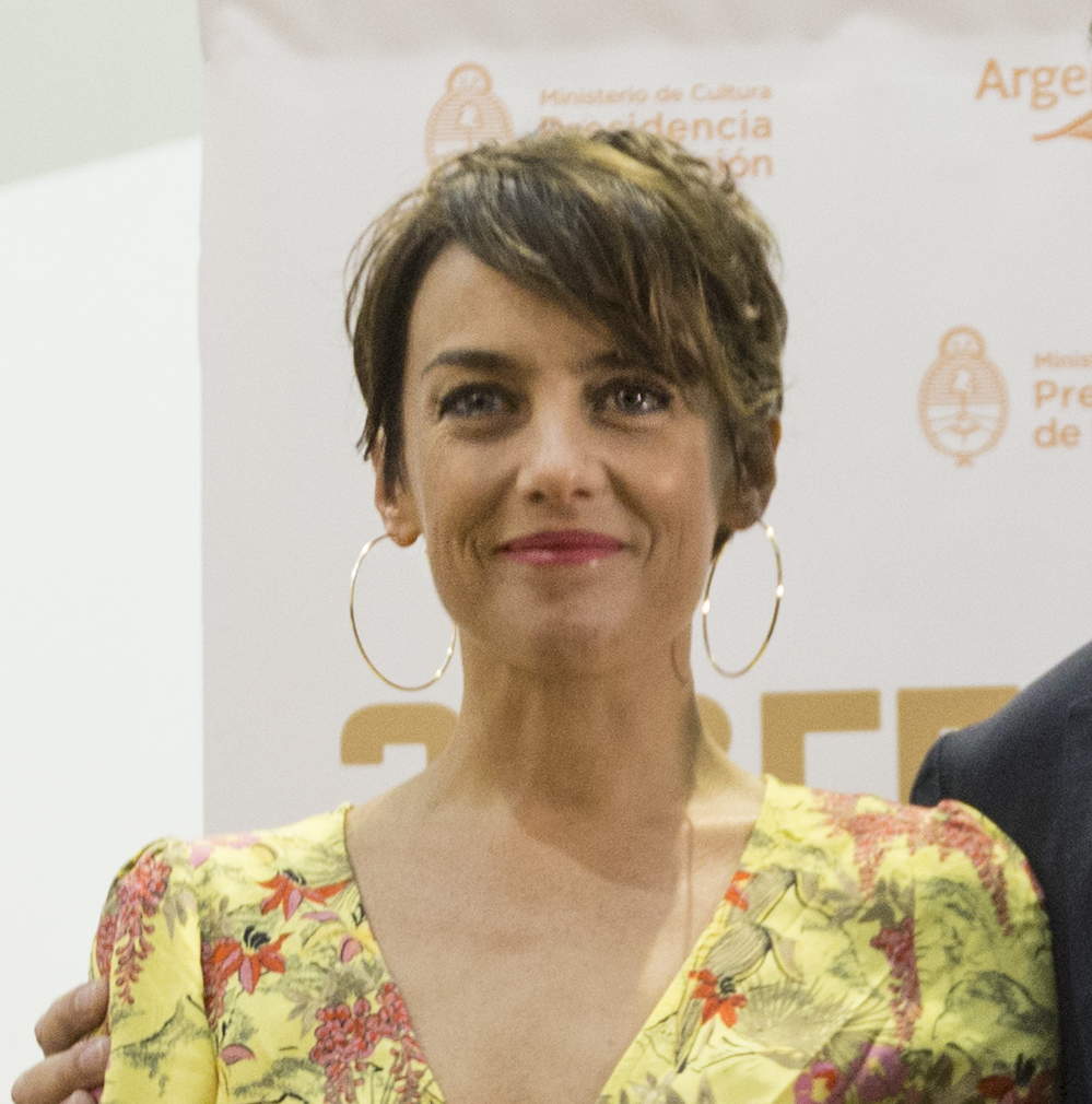 Mar del Plata, 17 de Noviembre de 2017.- Inauguró el 32º Festival Internacional de Cine. Foto: Soledad Amarilla / Mnisterio de Cultura de la Nación Argentina.